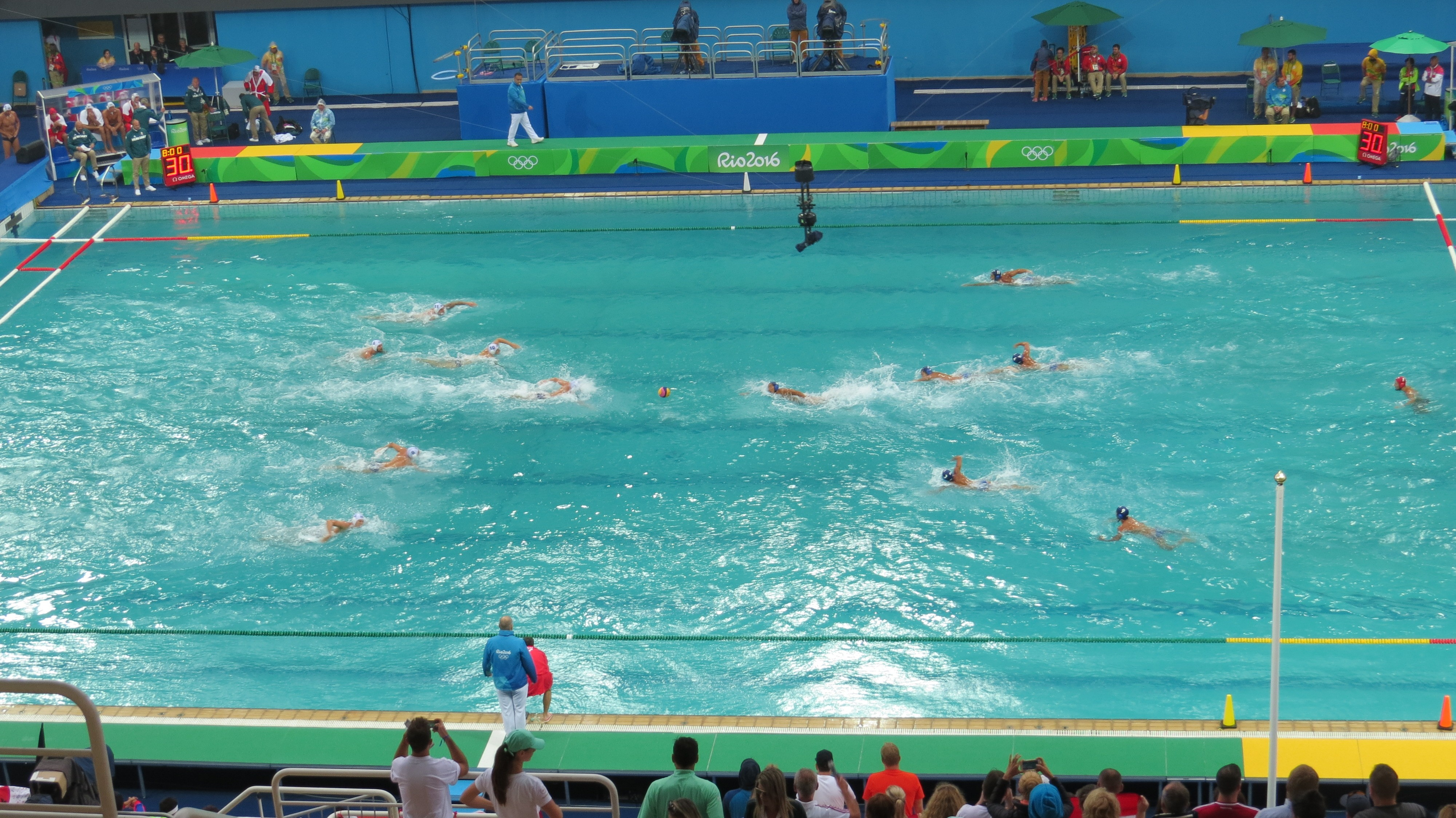 Rio 2016. Polo aquatico. sx50 07